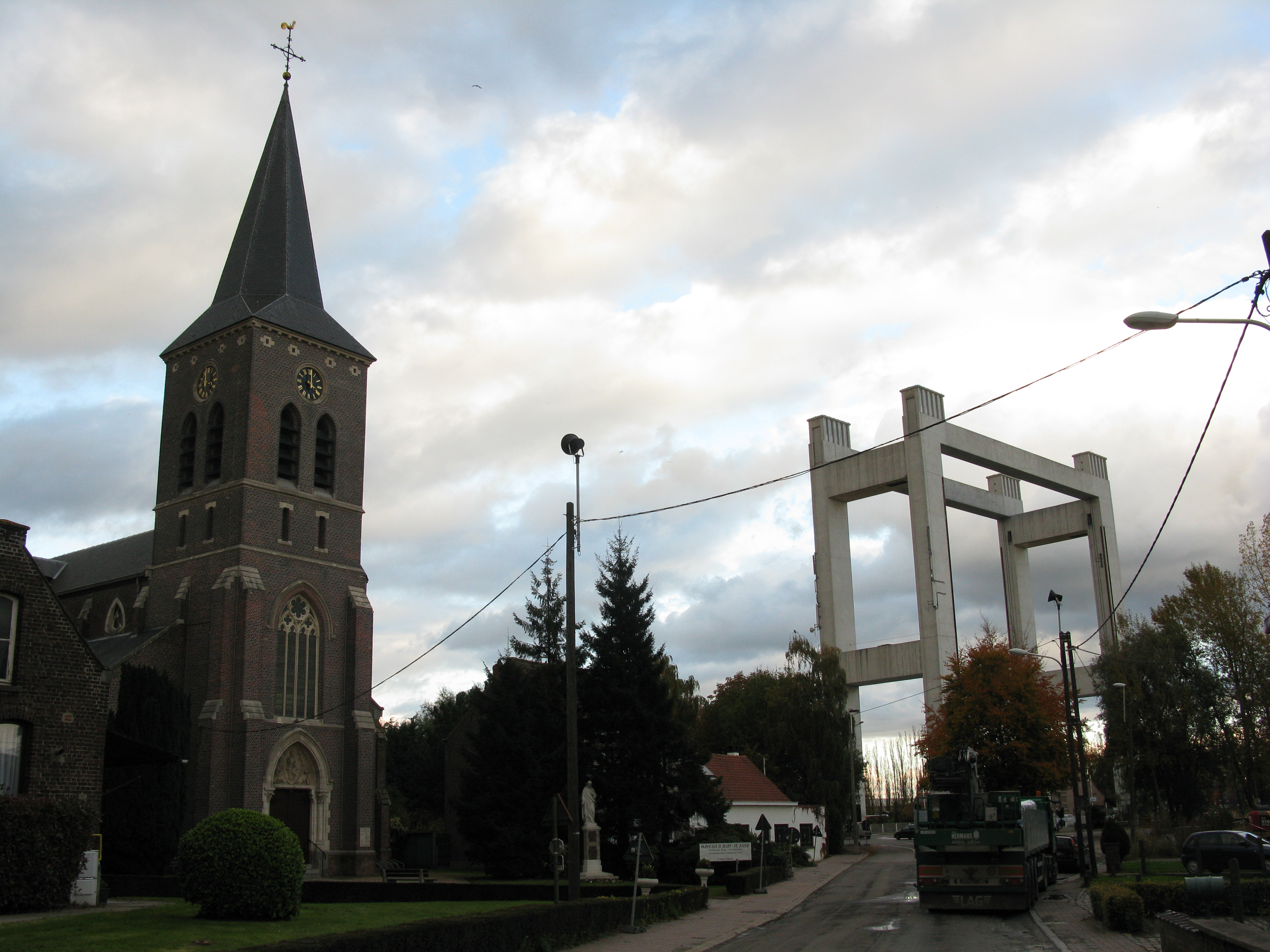 Verbrande Brug (kerk en brug)